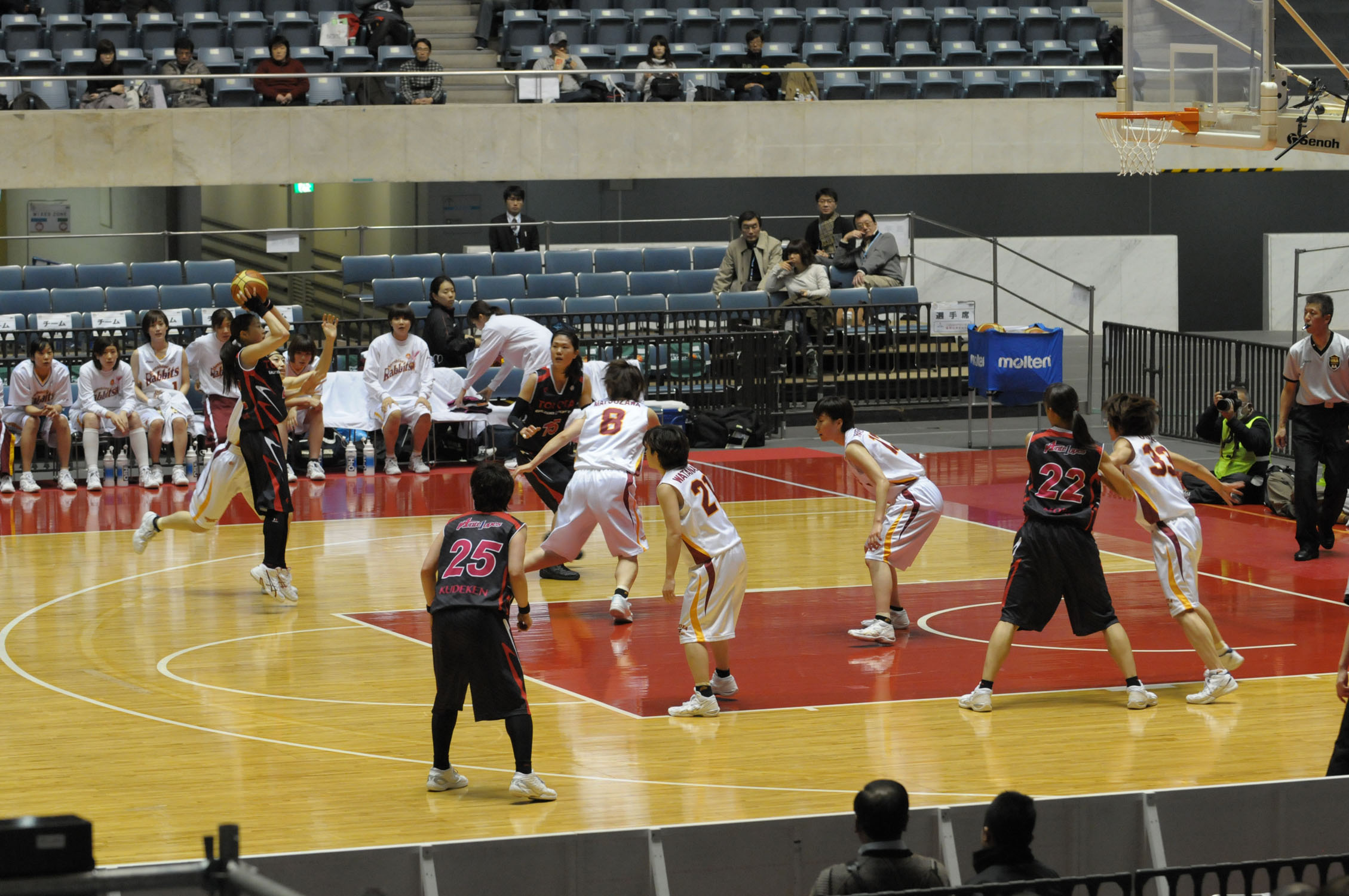 2014年全日本総合バスケットボール選手権大会準々決勝、トヨタ自動車アンテロープス対トヨタ紡織サンシャインラビッツ。代々木第一体育館で。